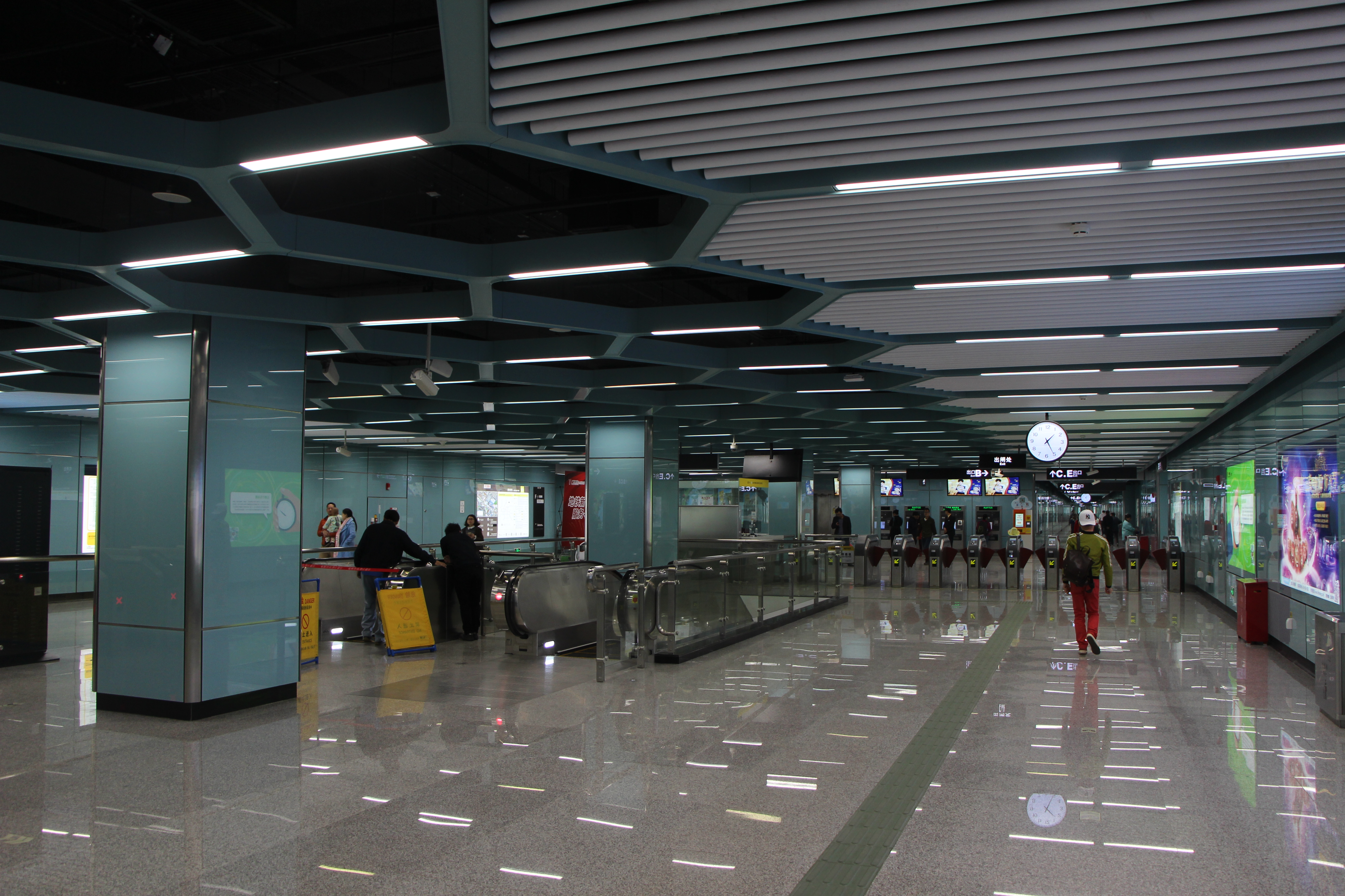 广州地铁员岗站